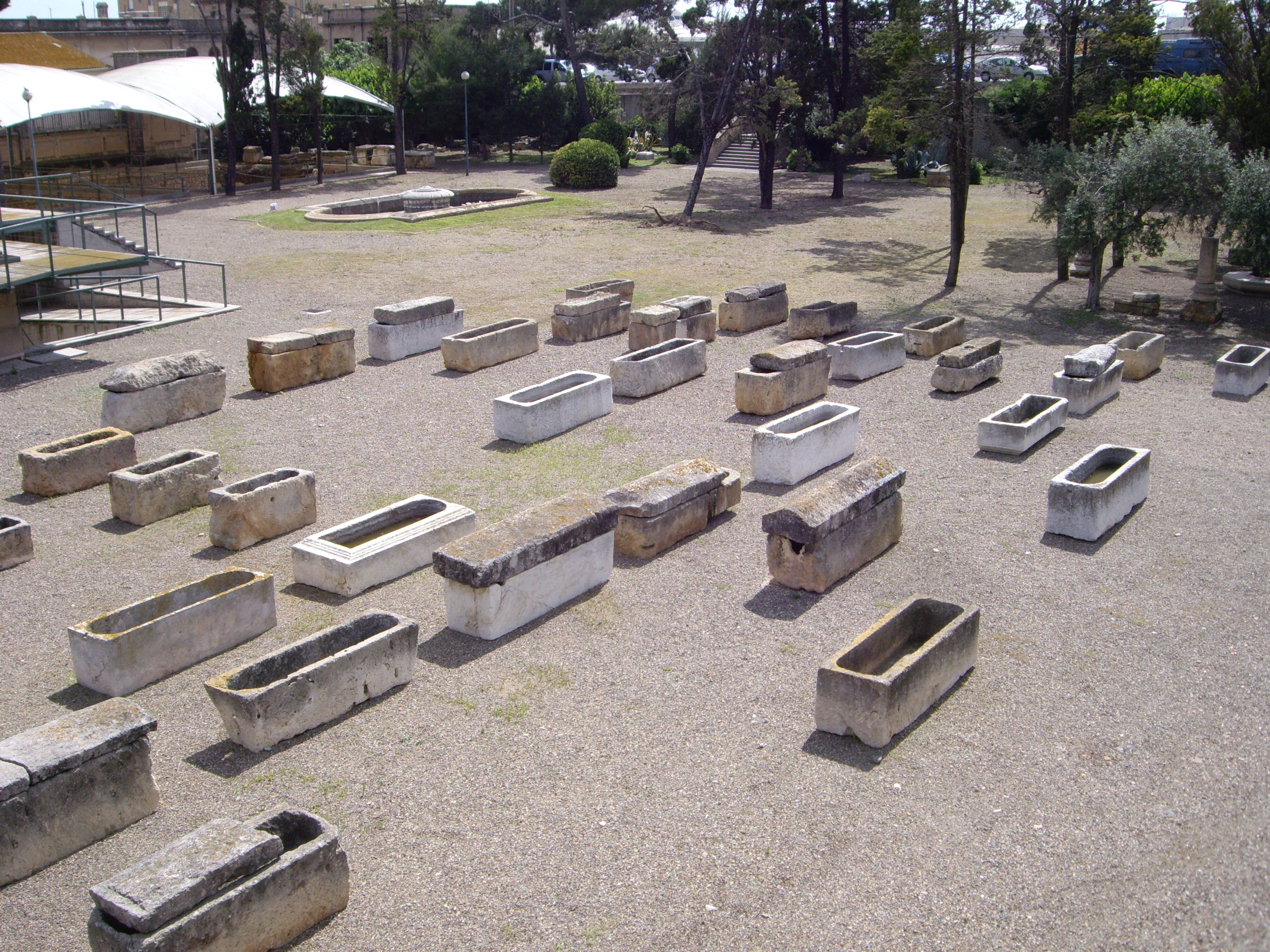 Necròpolis paleocristiana de Tàrraco, Tarragona, Tarragonés, Catalunya.